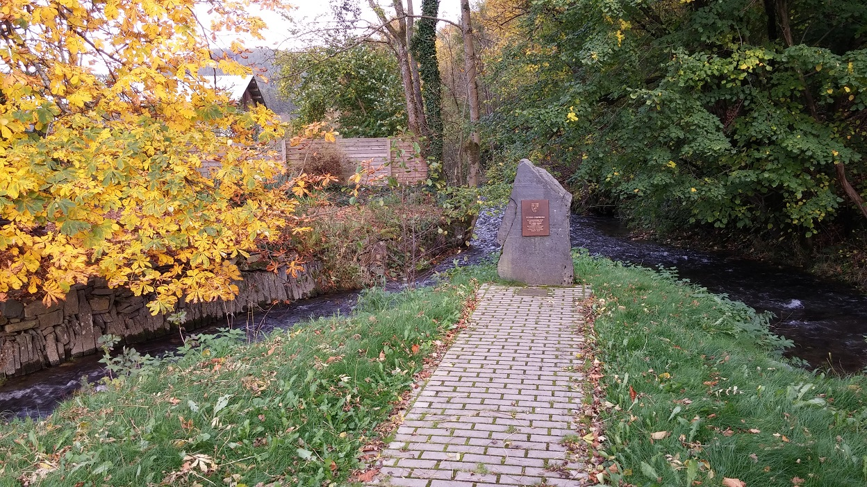 Züschen. Stein am Beginn der Nuhne